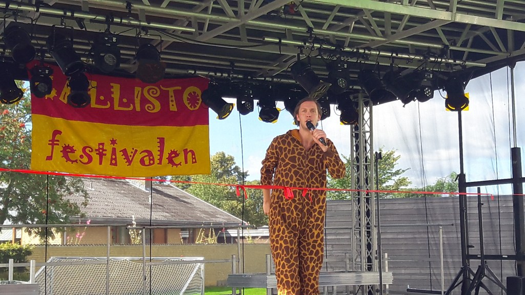 Callisto Festivals faste konferencier, Kalle Perlmutter, 2017